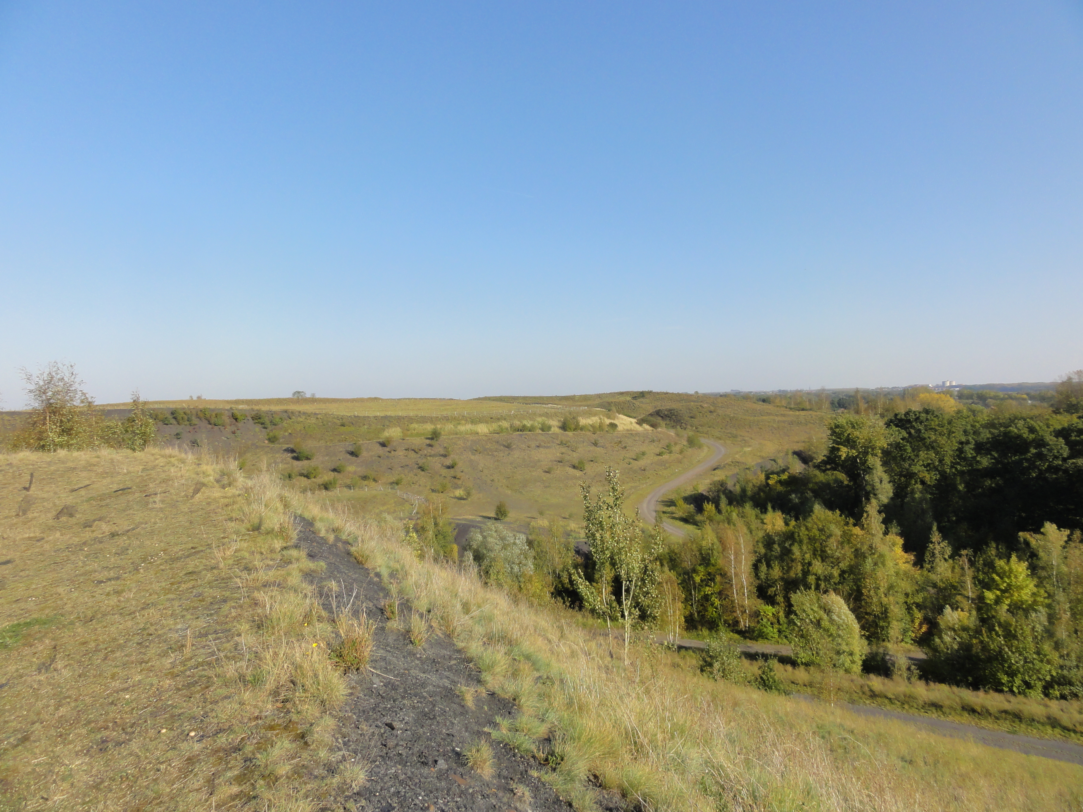 Terril n° 115 dit 2 du téléphérique, Fosse n° 2 de la Compagnie des mines d'Ostricourt, Libercourt, Pas-de-Calais, Nord-Pas-de-Calais, France.